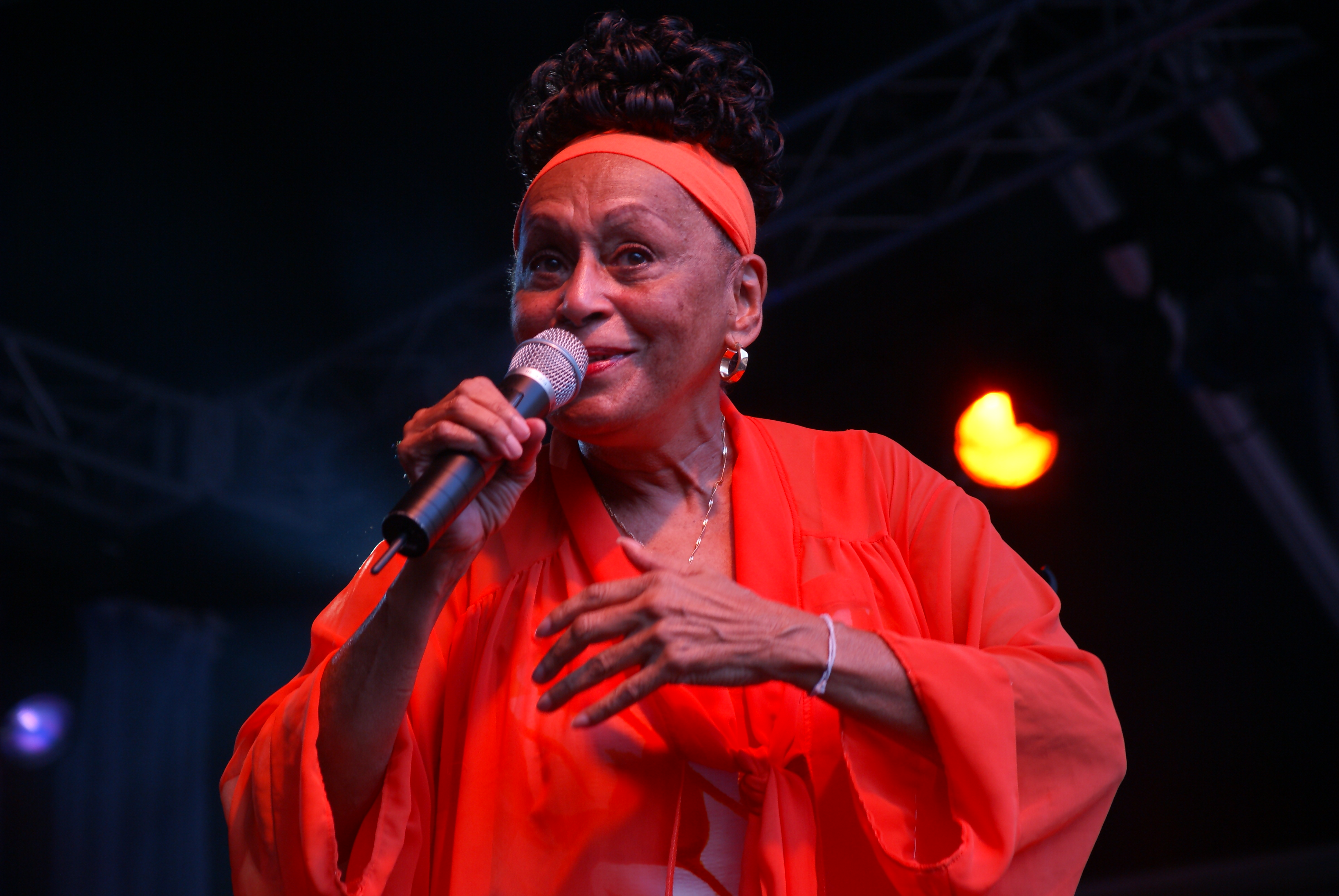 La cantant cubana Omara Portuondo